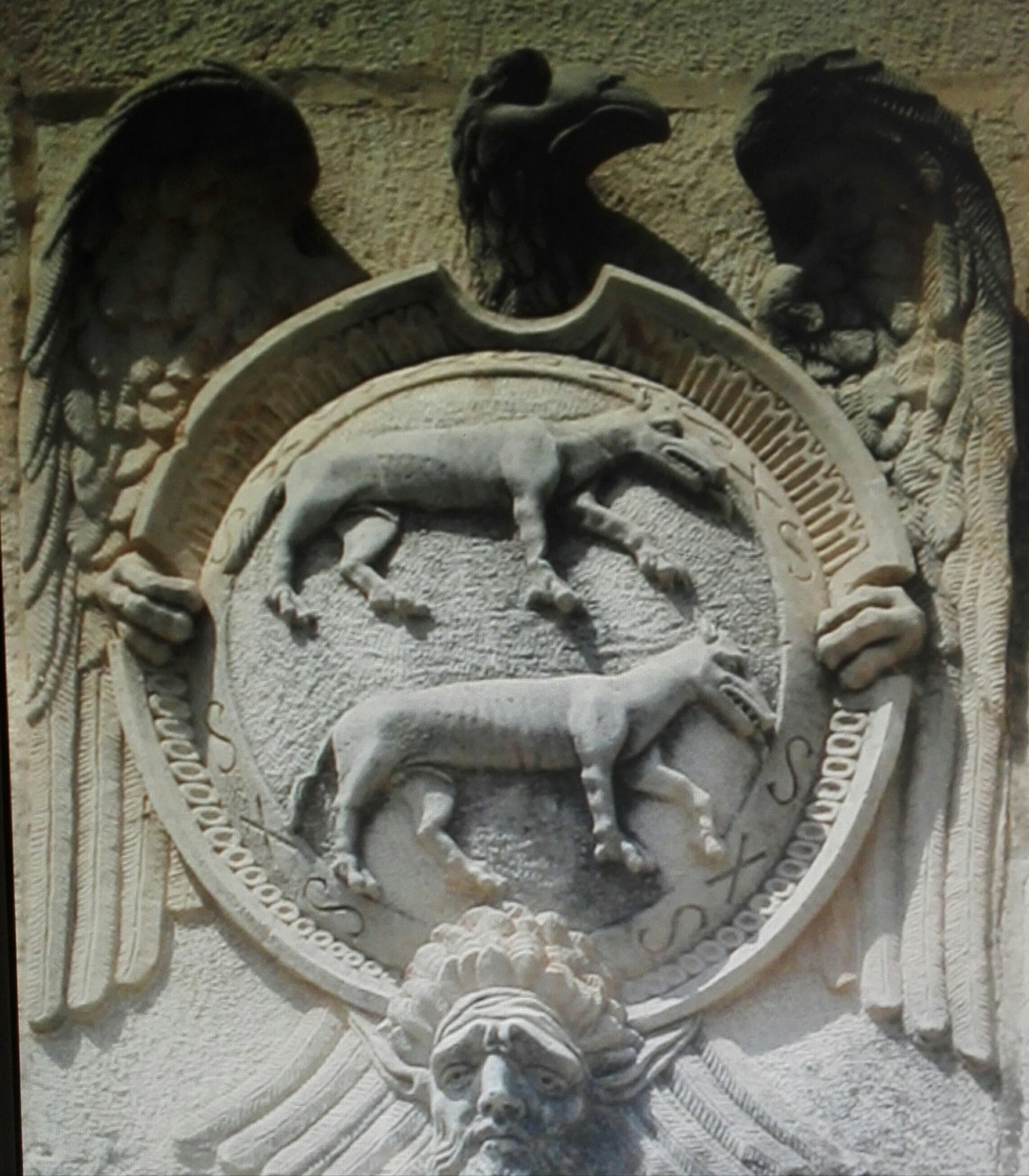 Escudo de los Cardenas del Palacio de los Condes de la Quinteria. Andujar